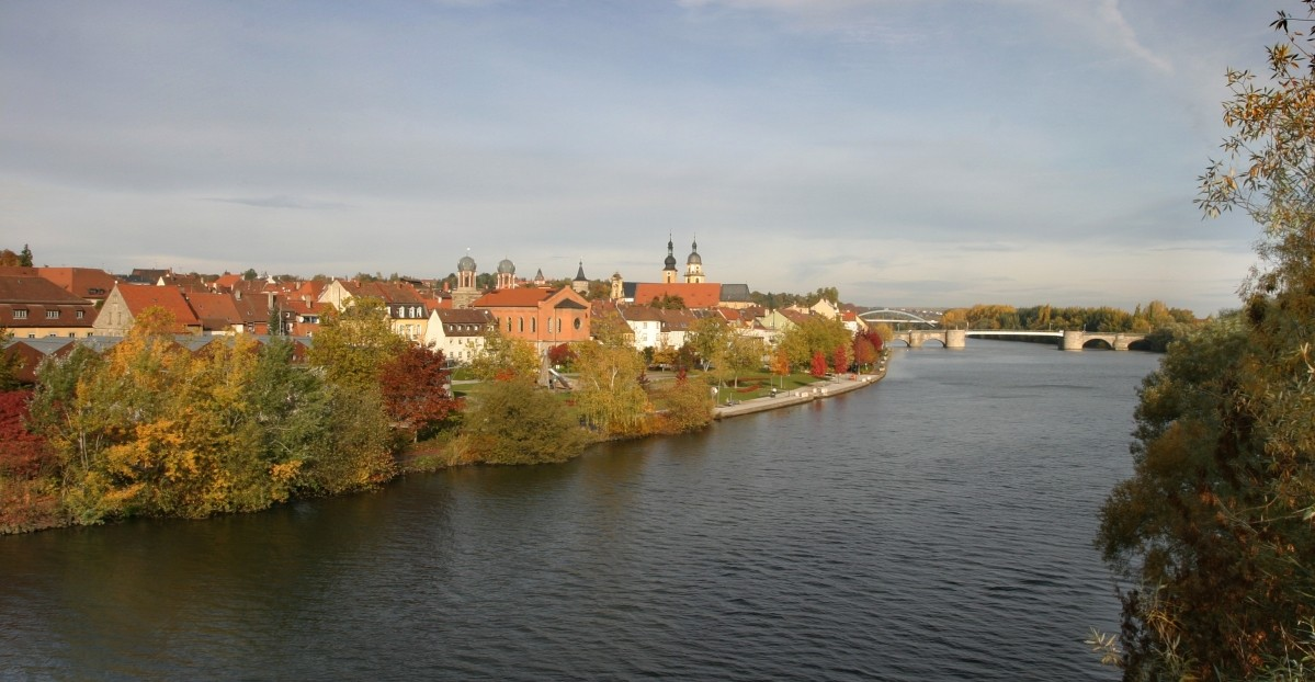 Beschreibung: Stadtbild von Kitzingen am Main Quelle: fotografiert am 23. Oktober 2004, Vormittag Fotograf: Michael Hofmann, Kitzingen Copyright Status: GNU Freie Dokumentationslizenz